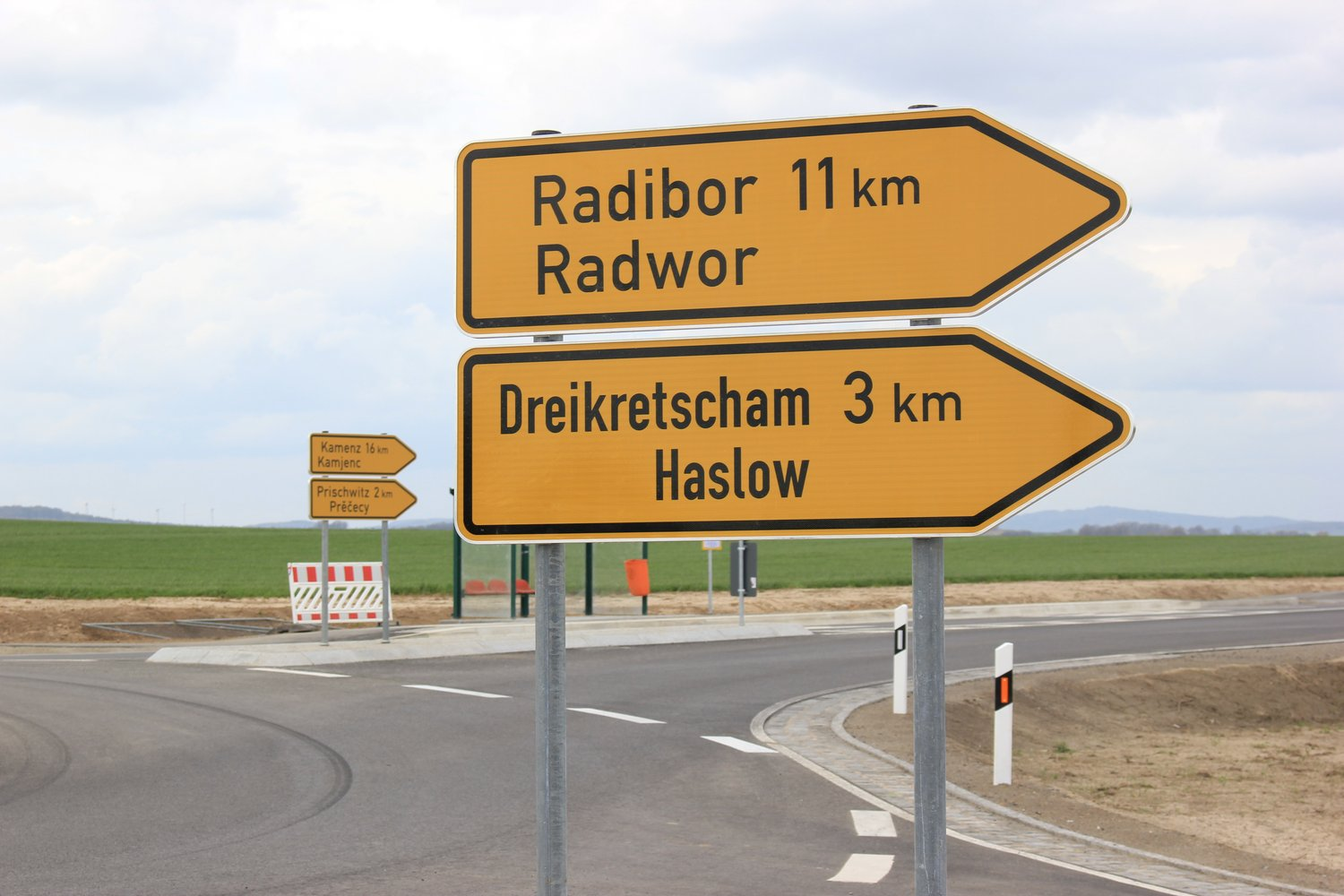 Hornjoserbsce: Nowy pućnik z němskimi a serbskimi pomjenowanjemi w samsnej wulkosći při kružnym wobchadźe mjez Błohašecami a Prěčecami.